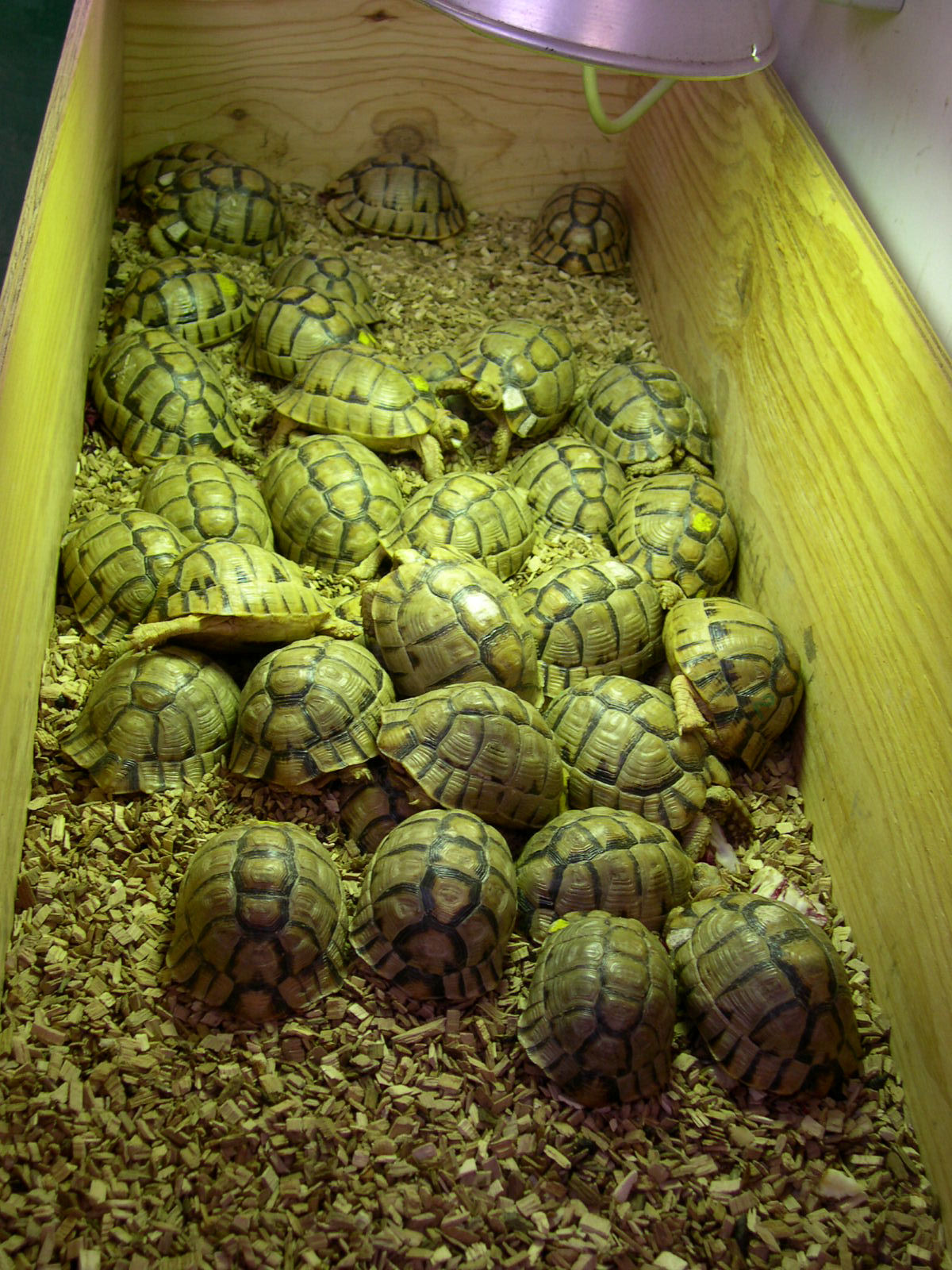 Da sequestro effettuato dal Corpo Forestale dello Stato nel 2006, su una nave cargo attraccata al Porto di Genova e proveniente dall'Africa mediterranea, momentaneamente affidate alle cure dei guardiani del rettilario del Bioparco di Roma